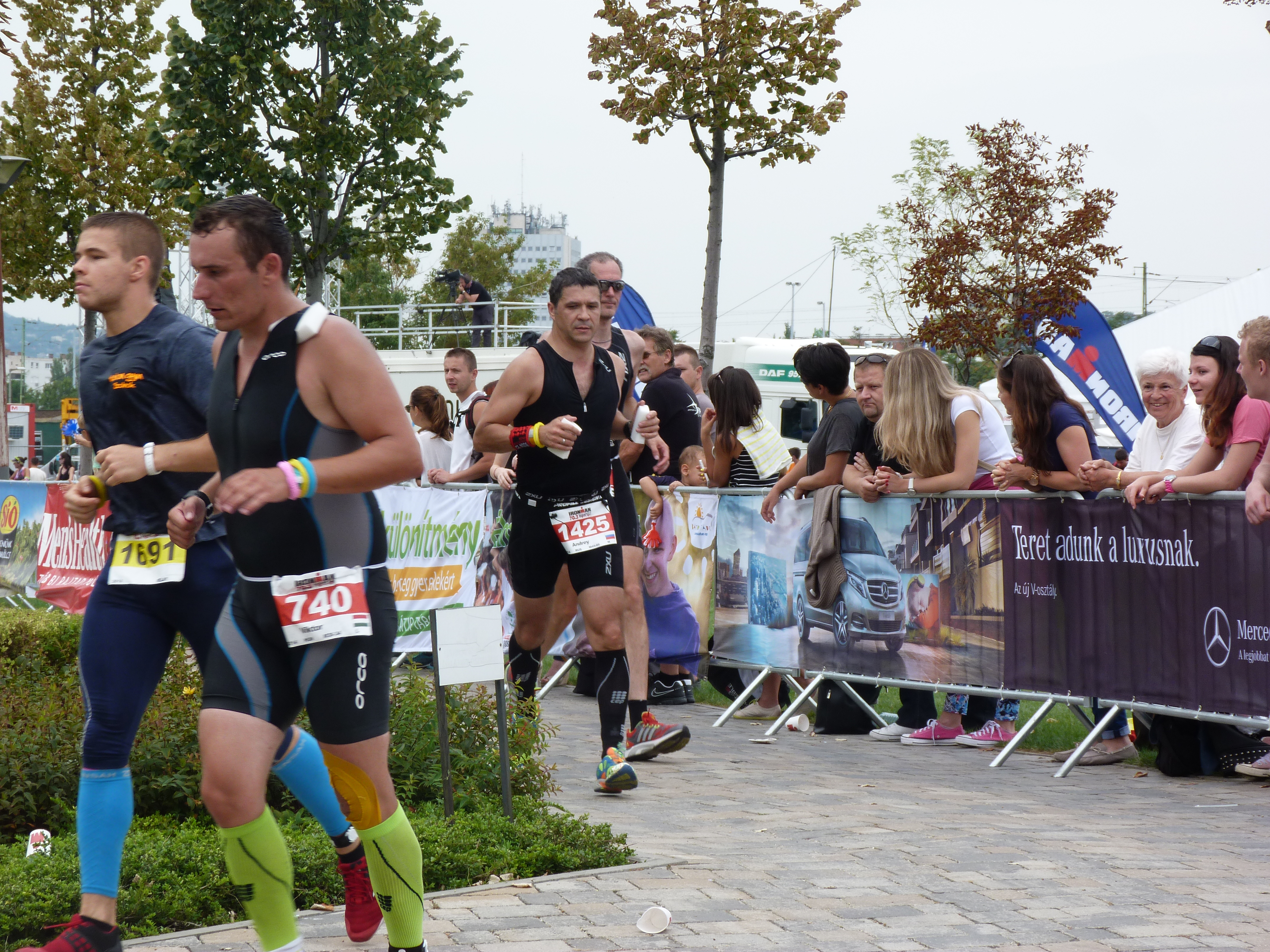 A felvételek 2014. augusztus 23-án, szombaton készültek Budapesten, a Kopaszi-gáton. Ironman 70.3. A triatlon versenysorozat 2006-ban indult az eredeti IRONMAN versenytávok felén. A 2014. augusztus 23-án Budapesten megrendezett IRONMAN 70.3 sporttörténeti esemény: Budapest az első közép-kelet európai város ahol IRONMAN logó alatt triatlon versenyt szerveztek. ©© Derzsi Elekes Andor, Budapest 2014, You are authorised to use these photos and vids under Creative Commons – even for commercial, for profit purposes. Photos must be attributed to Derzsi Elekes Andor. All of the photos and vids in the Metapolisz DVD line are under Creative Commons and can be used even for commercial – for profit – purposes. Recommended Citation Derzsi Elekes Andor: Metapolisz DVD line